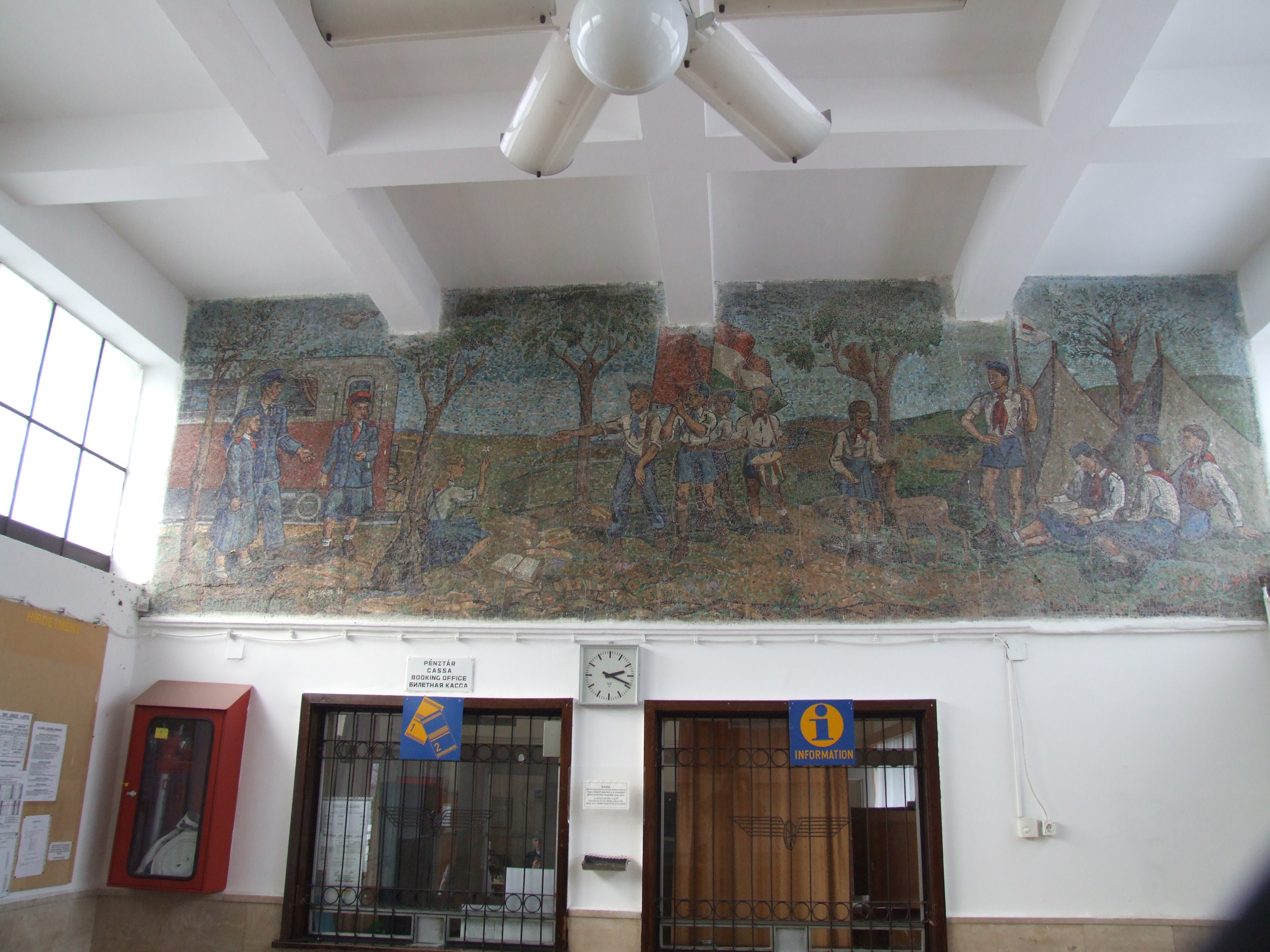 Úttörővasút - Széchenyi-hegy állomás mozaikja (Göllner Miklós, Jánossy Ferenc, 1953). - Magyarország, Budapest,XII. kerület, Hegyhát út, A Golfpálya és a Hegyhát út kereszteződésnél